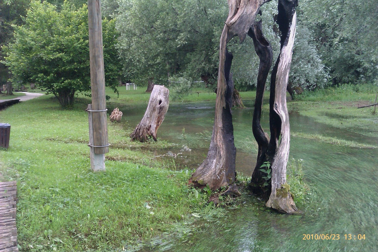 Nova Kršlja, Croatia